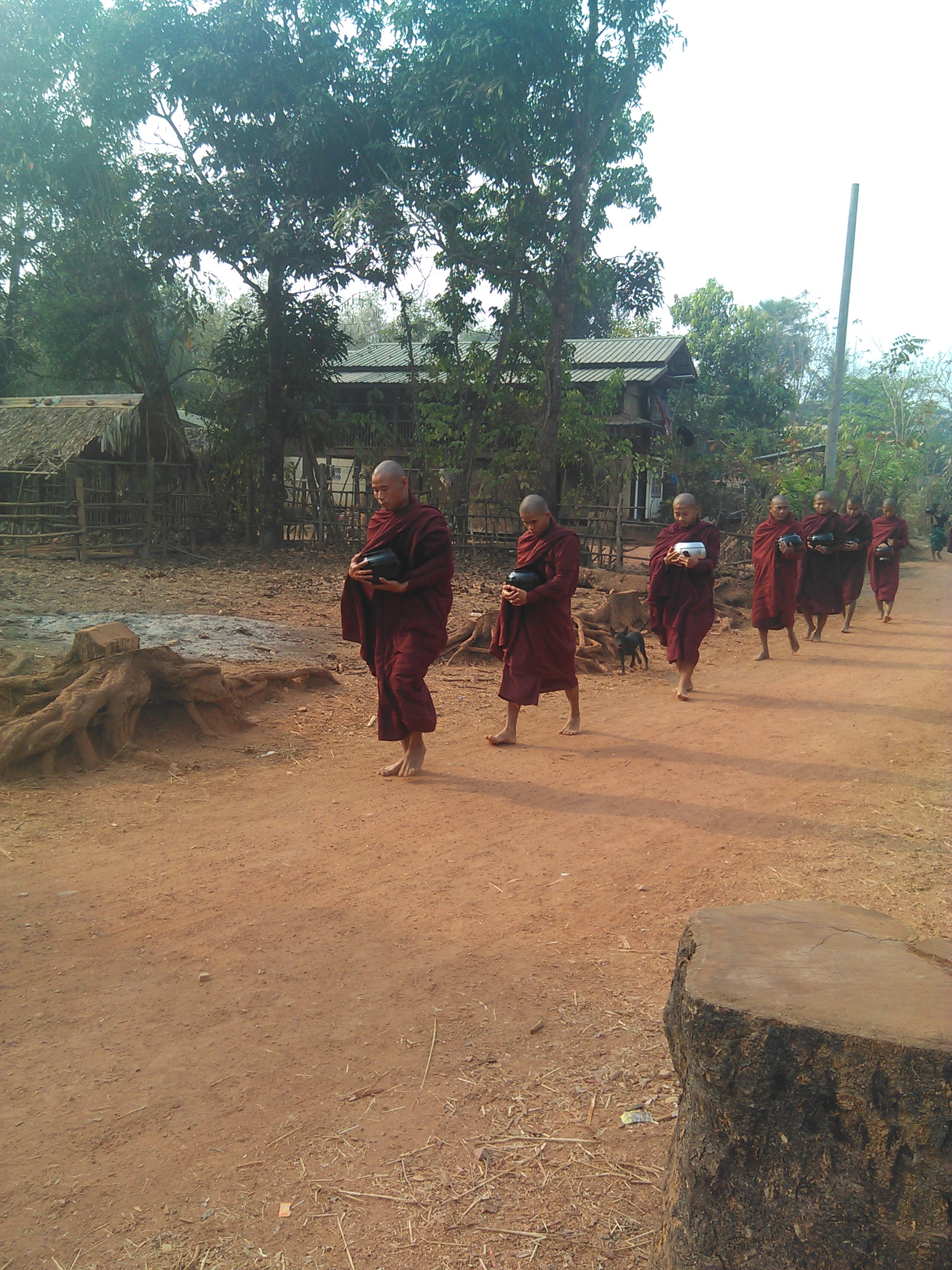 မြန်မာဘာသာ: ရဟန်းများ ဆွမ်းခံကြွနေပုံ။